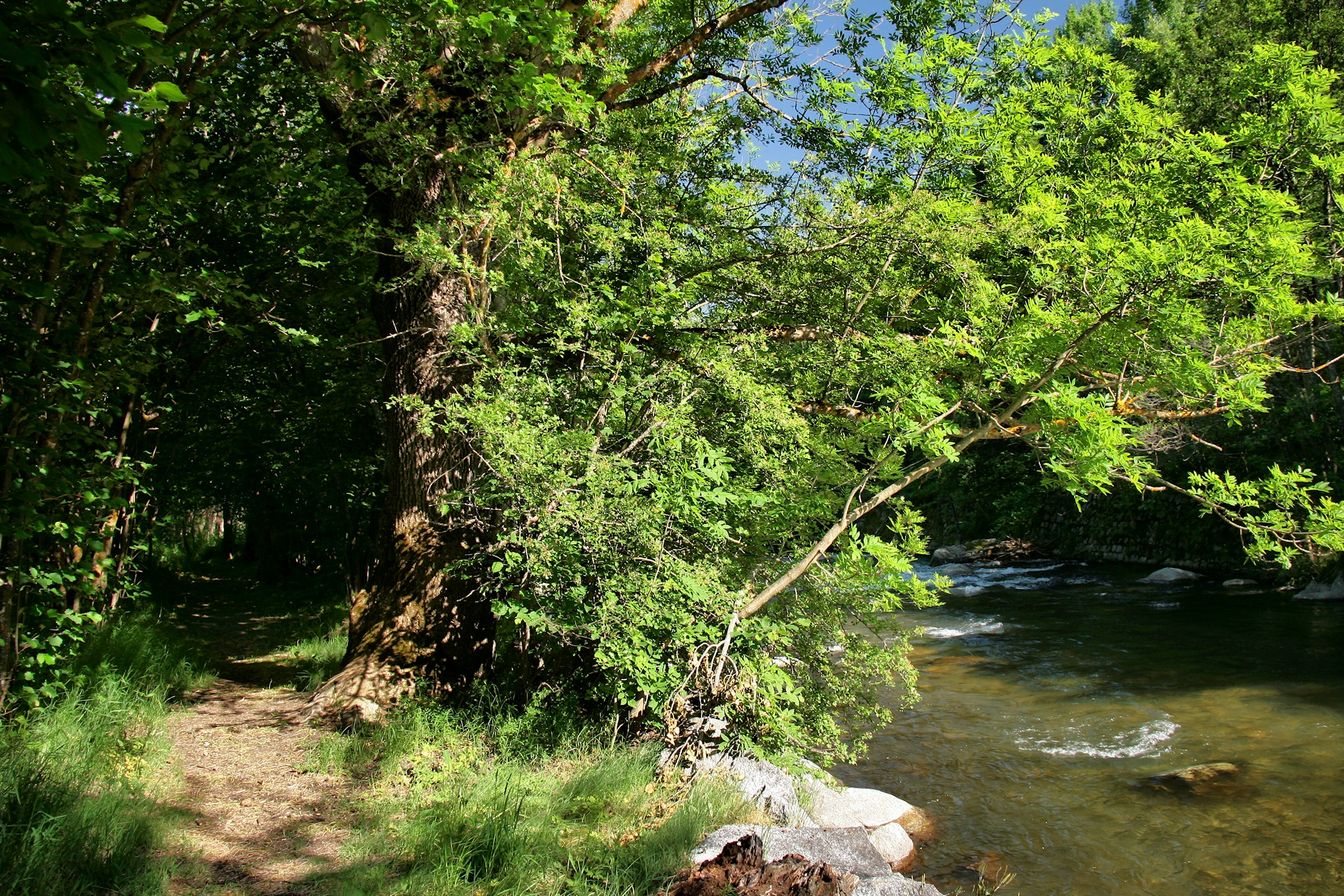 Riu Querol